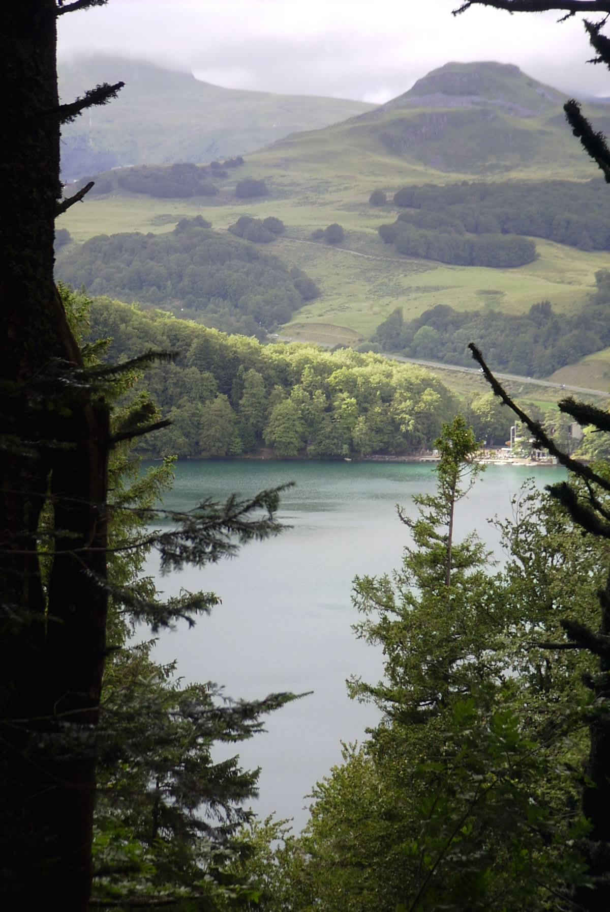 Summary Bildbeschreibung: Lac Pavin Quelle: eigenes Foto Fotograf/Zeichner: bodoklecksel 19:25, 3. Jun 2006 (CEST)